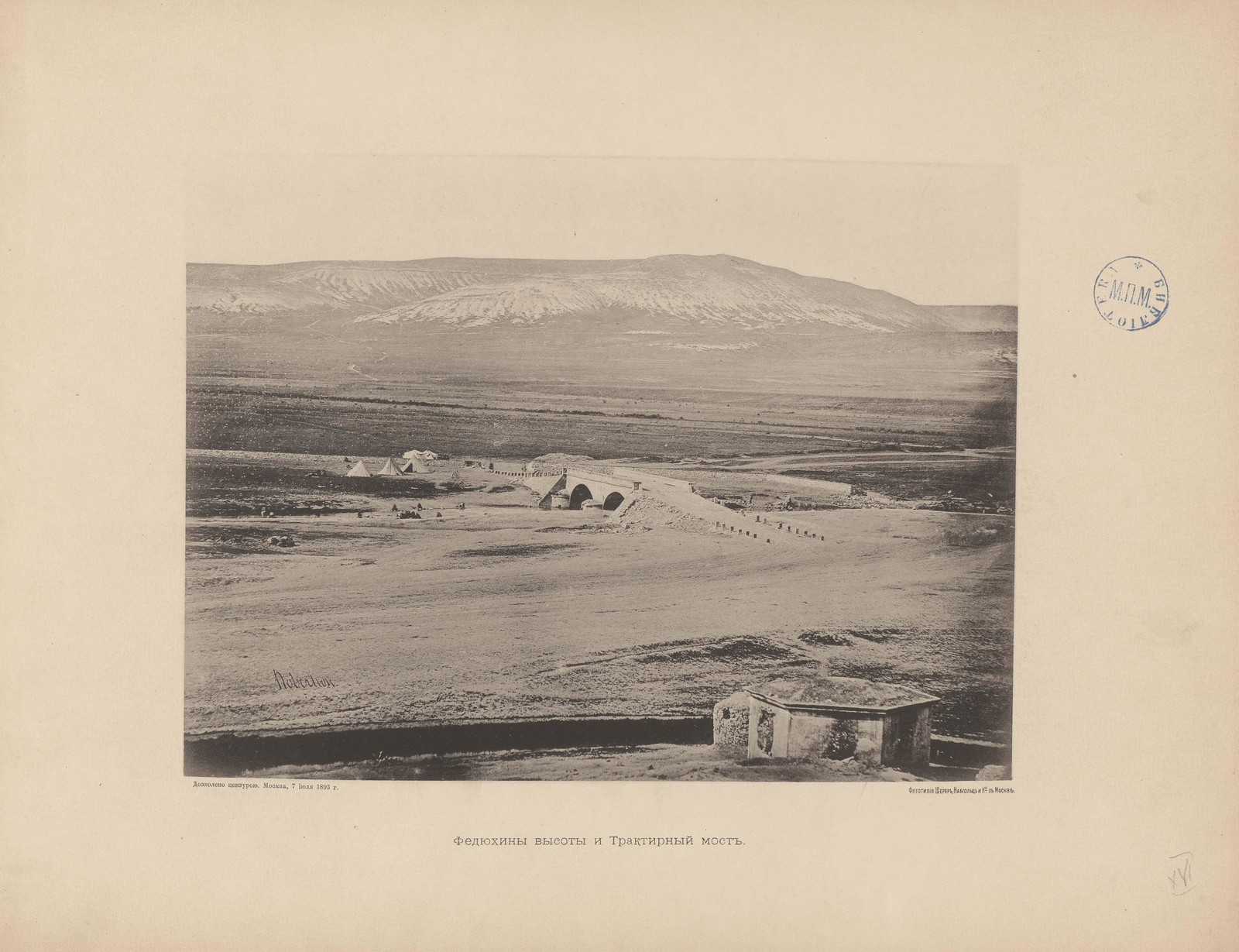 Федюхинские высоты и Трактирный мост, Севастополь, 1904 год.